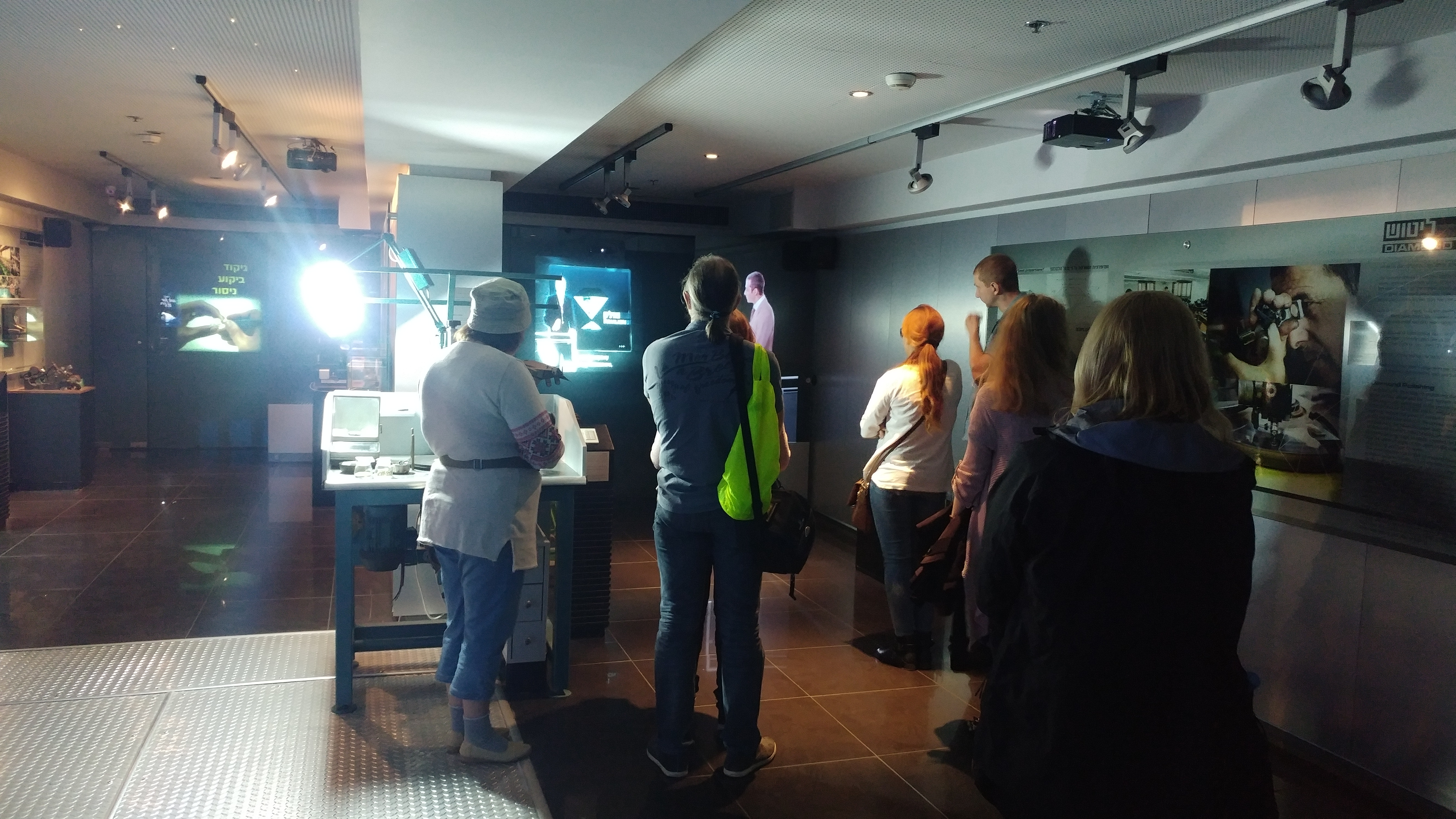 סיור במוזיאון היהלומים